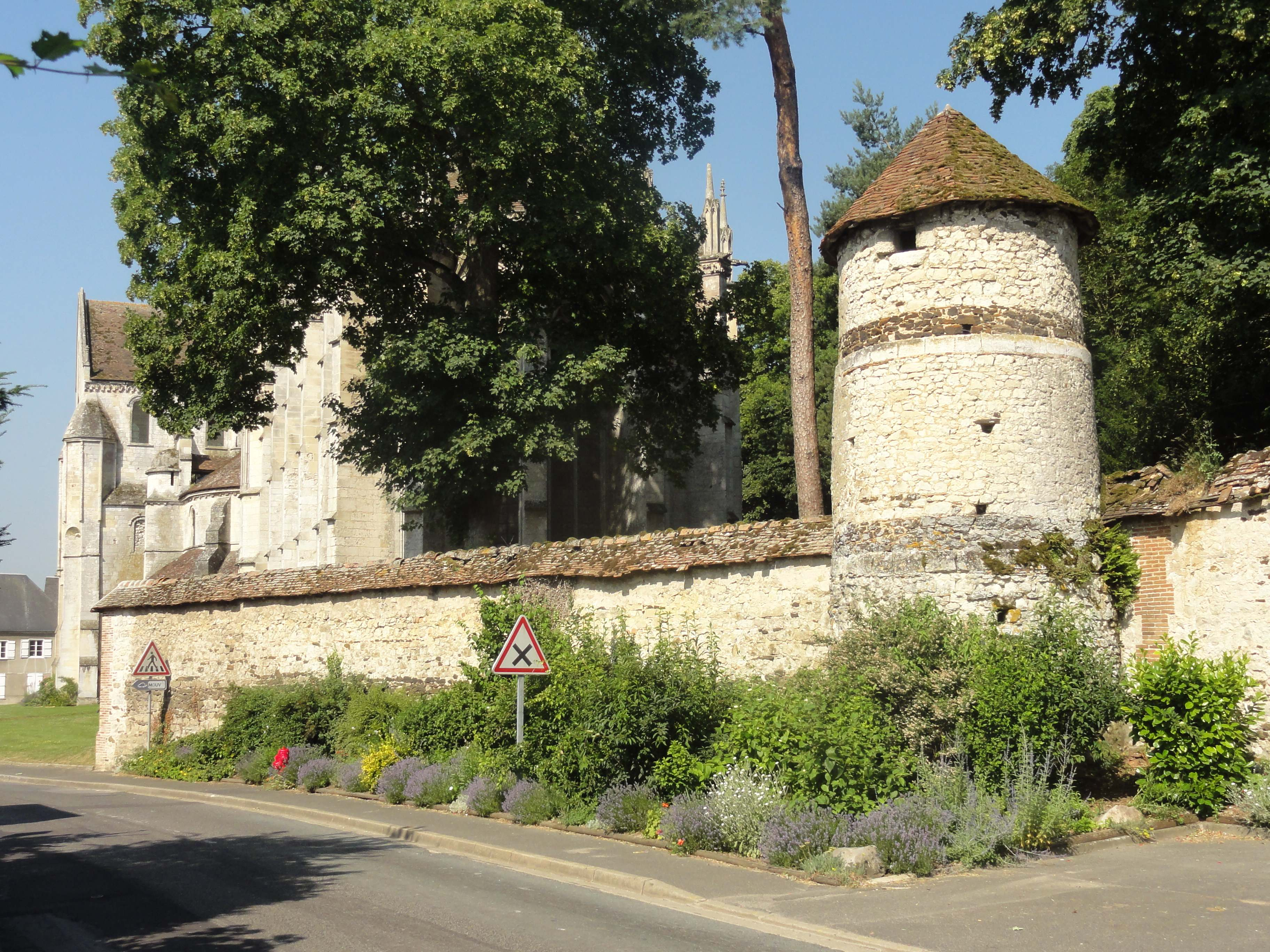 Enceinte de l'abbaye avec la tour dite « tour guerrière », rue Michel-Greuet.